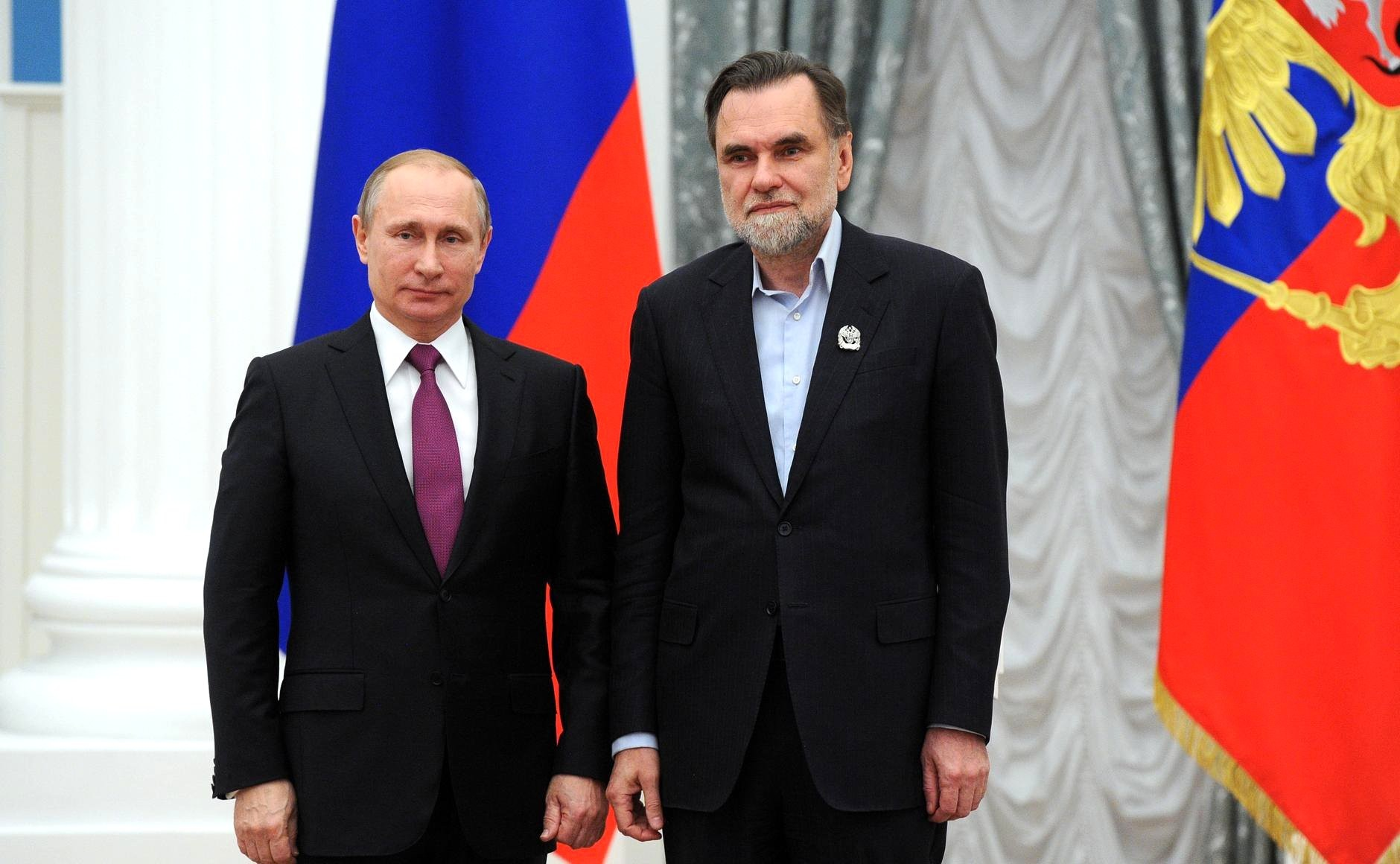 Вручение премий Президента молодым деятелям культуры и премий за произведения для детей и юношества. Премии Президента в области литературы и искусства за произведения для детей и юношества 2015 года удостоен продюсер Сергей Сельянов